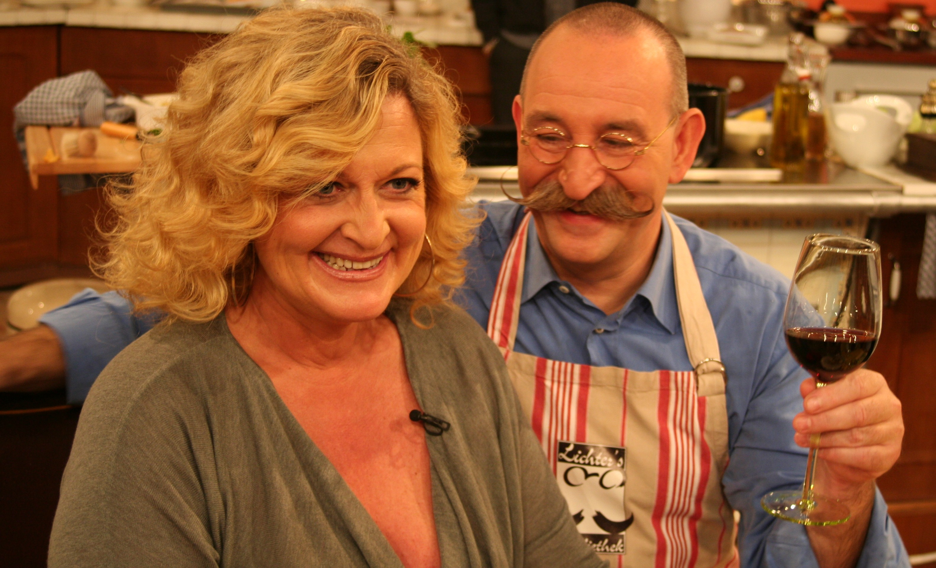 Susanne Fröhlich mit Horst Lichter in der Sendung Lafer Lichter Lecker